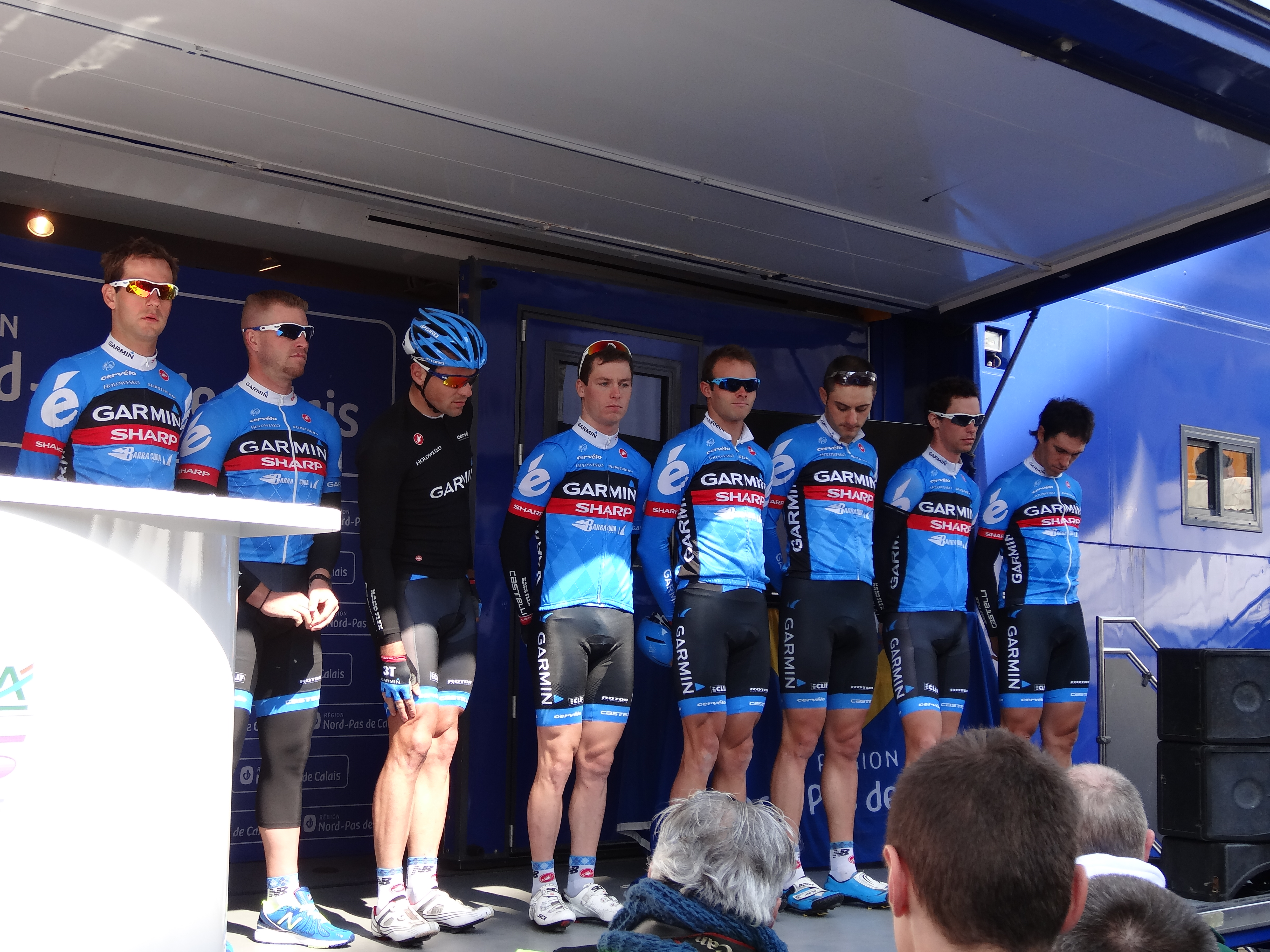 Reportage photographique réalisé le mercredi 1er mai 2013 au départ de la première étape de l'édition 2013 des Quatre jours de Dunkerque à Dunkerque, Nord, Nord-Pas-de-Calais, France. Le dossier photographique montre des véhicules de course exposés, la caravane publicitaire, la présentation des coureurs, et le départ. Depicted people: Raymond Kreder, Sébastien Rosseler, Steele Von Hoff, Martijn Maaskant, Alex Rasmussen, Jacob Rathe, Michel Kreder and Koldo Fernández